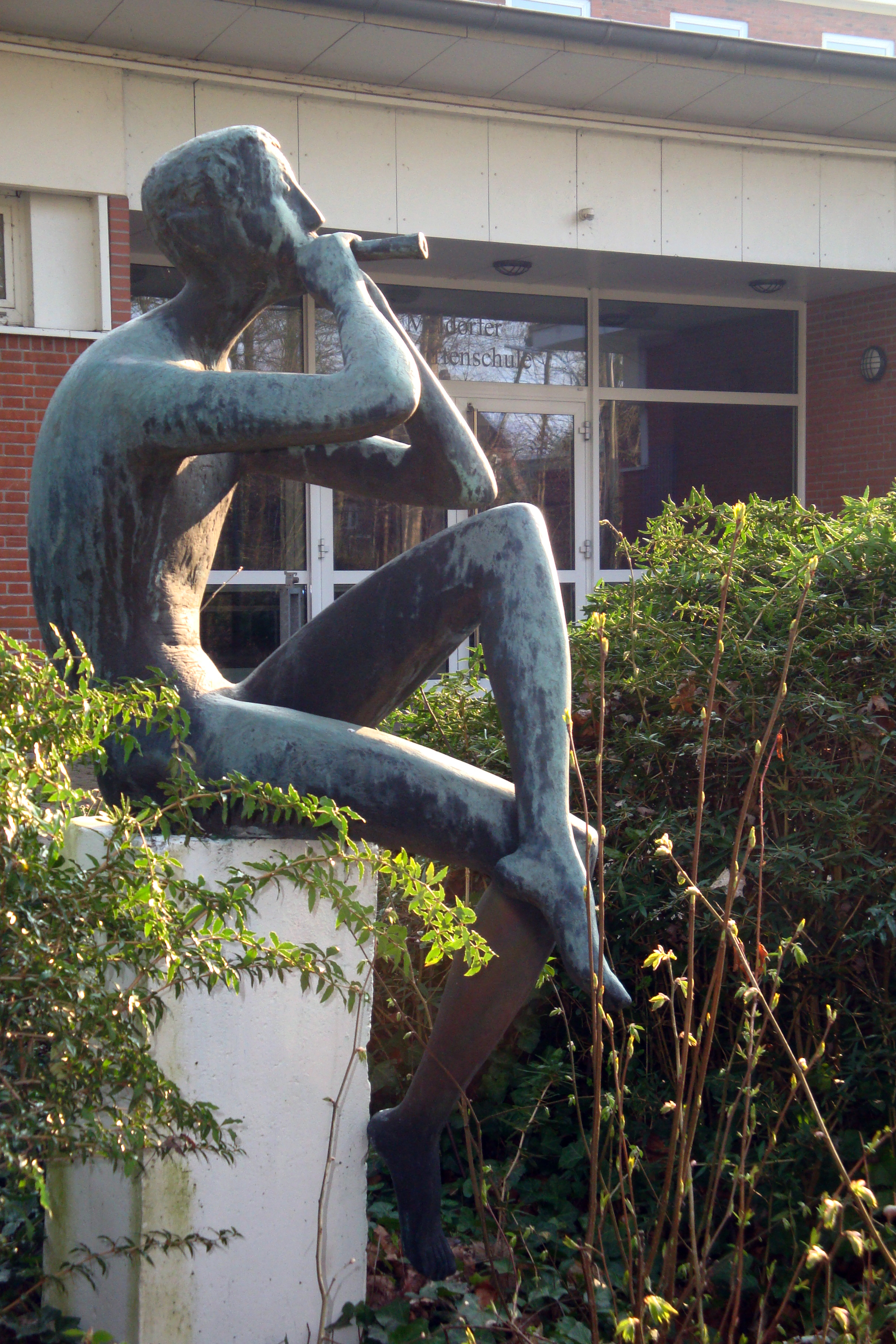 Bronzeplastik eines Flöte spielenden Knaben von Karlheinz Göthke am Weg zur Schule